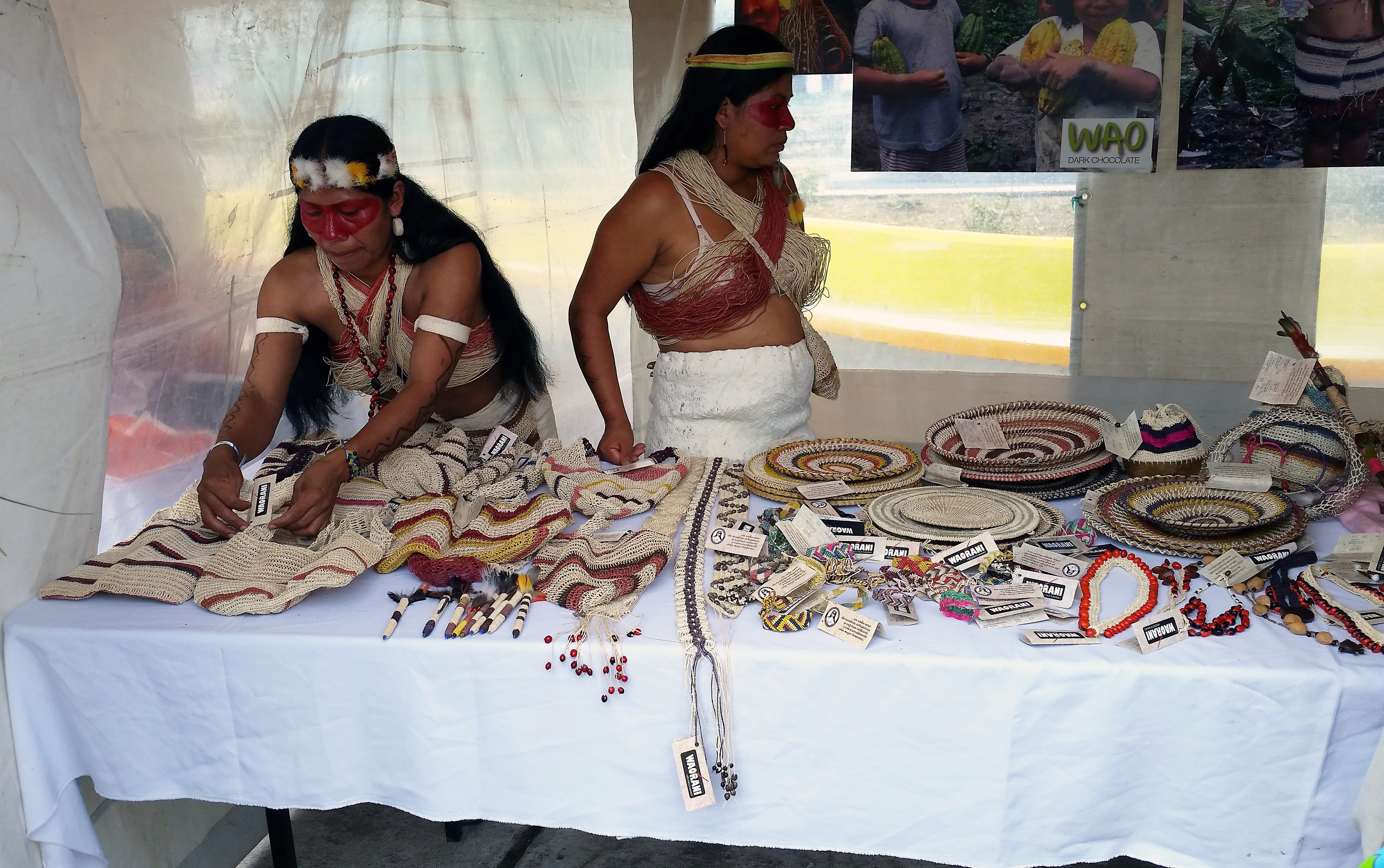 Artesanías huaoranis en la Feria del Cacao y Chocolate “Antisuyu Chocolate Wasi” Archidona 2015